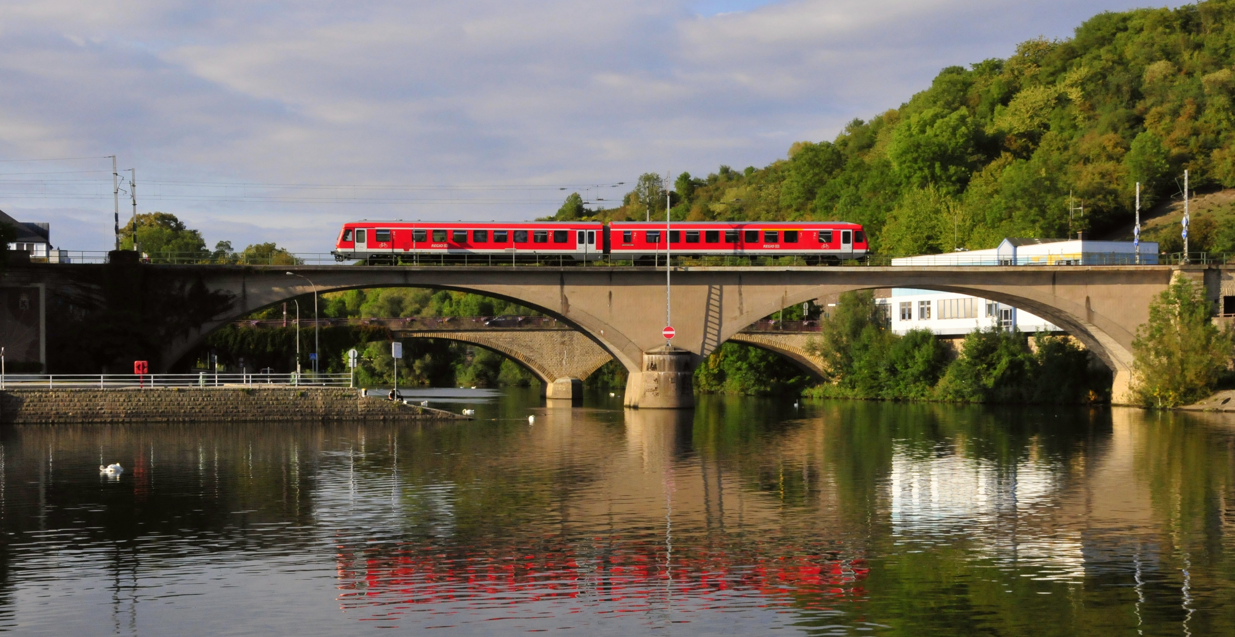 Wasserbillig, Sauermündung